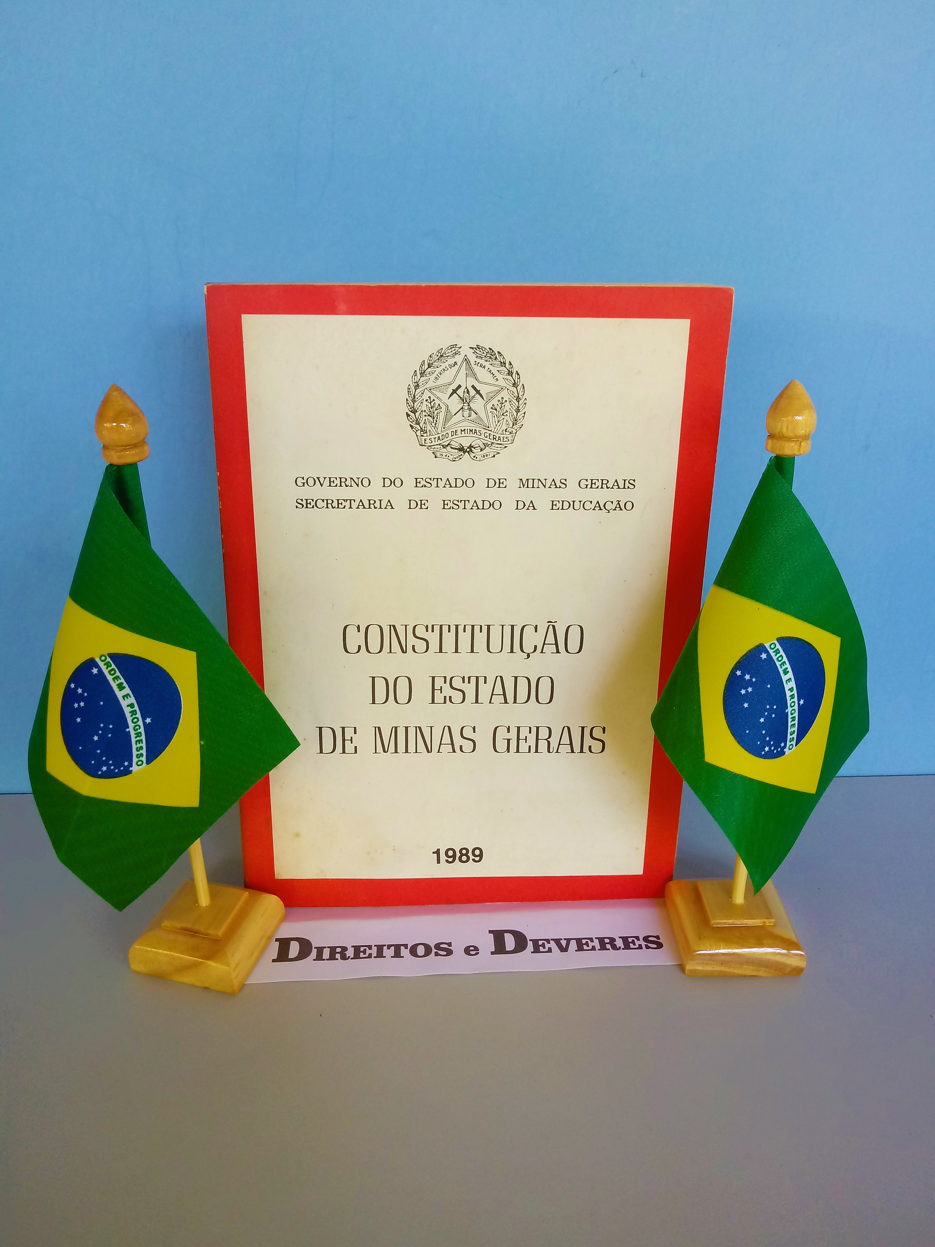 Constituição do Estado de Minas Gerais do ano de 1989.